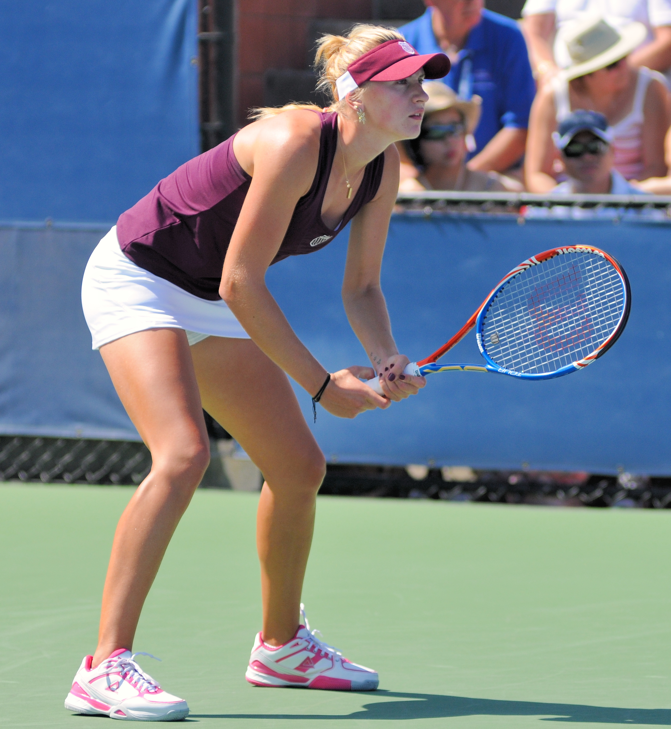 Olga Govortsova - US Open 2010